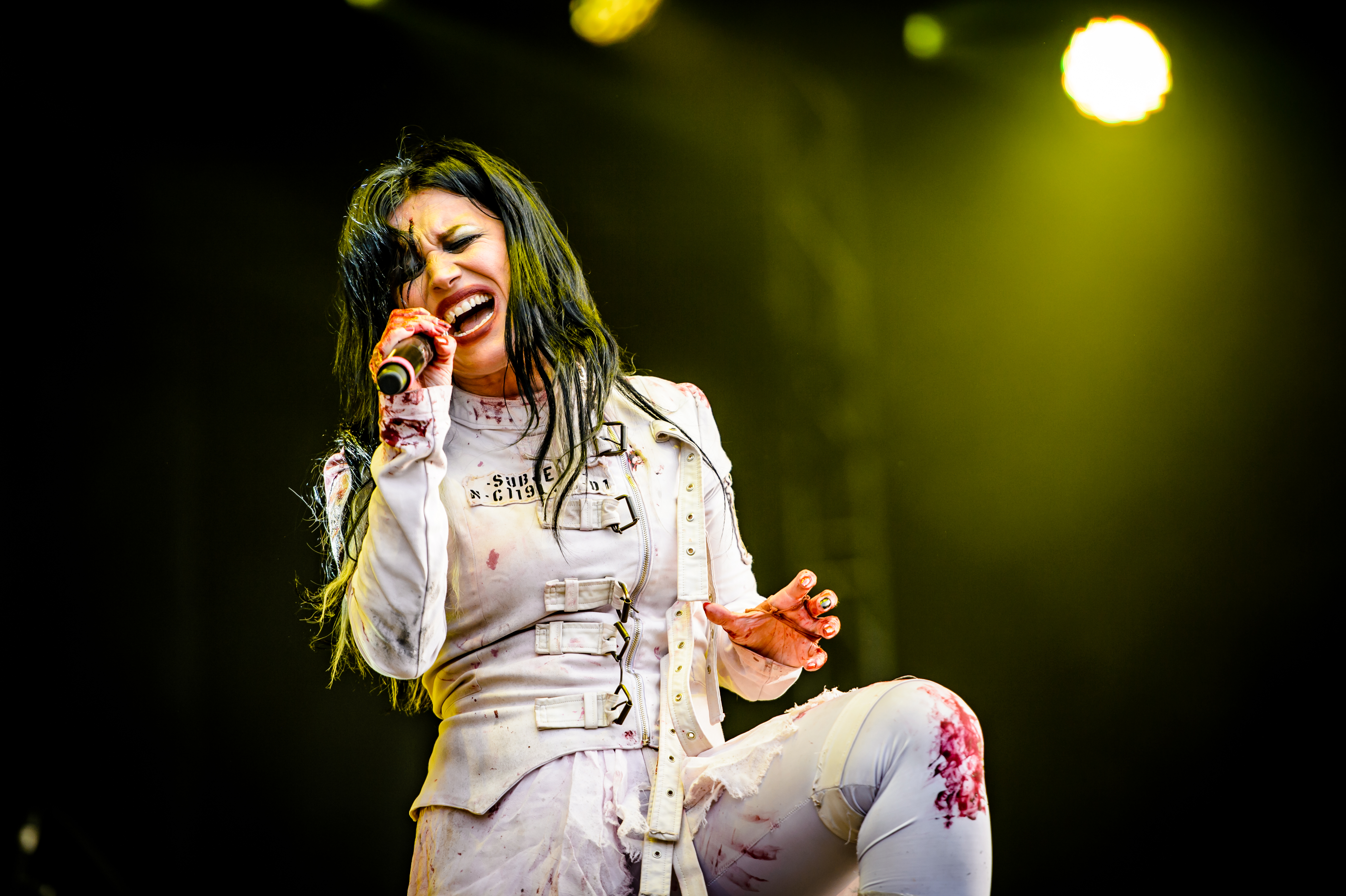 'RockHarz Open Air 2017; Ballenstedt':Cristina Scabbia 'Lacuna Coil'